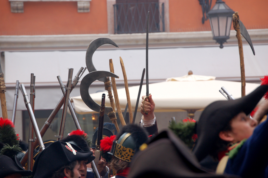 Il popolo contro i francesi durante la rievocazione delle Pasque Veronesi